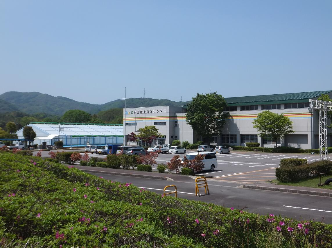 綾川町ふれあい運動公園 B&G海洋センター 体育館、プール